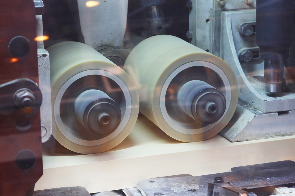 Строгание ламелей клееного бруса. Сокольский ДОК, Россия